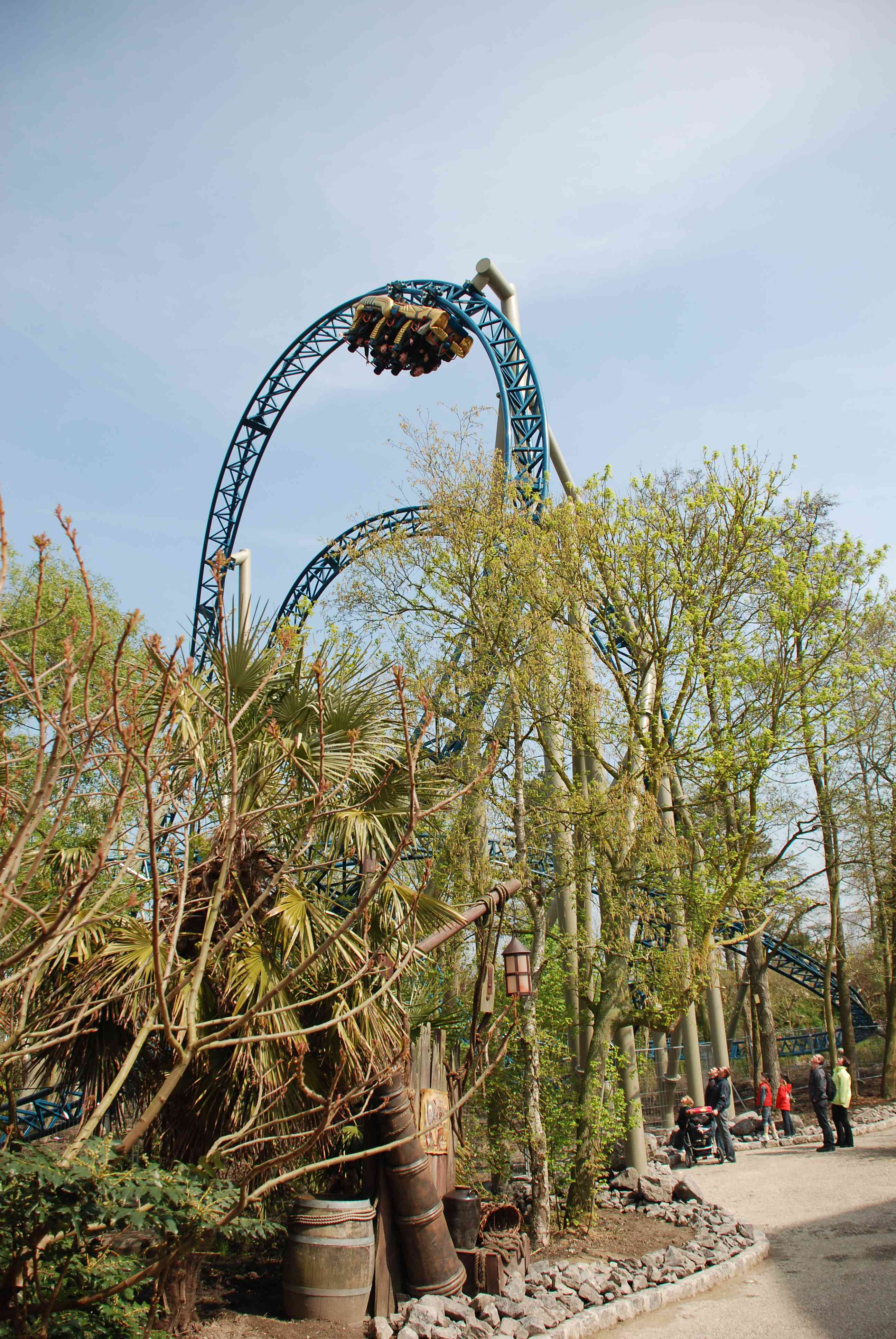 Gerstlauer Launch Coaster (Anubis: The Ride - Plopsaland)